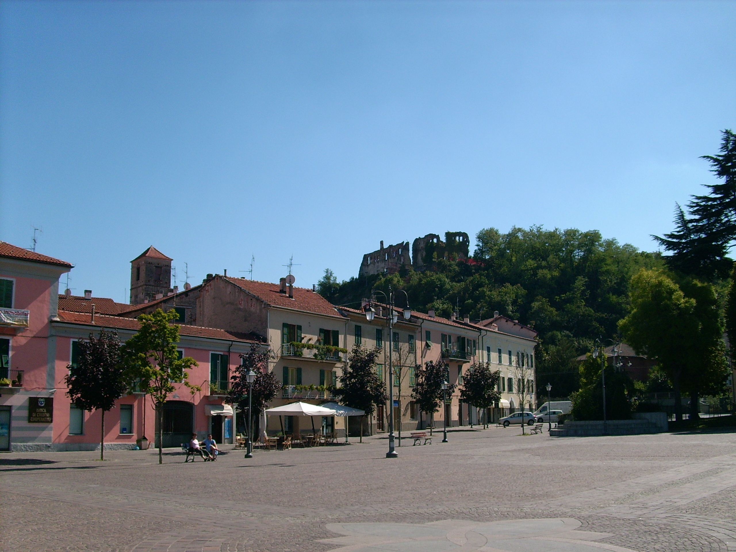 Cairo Montenotte, Liguria, Italia